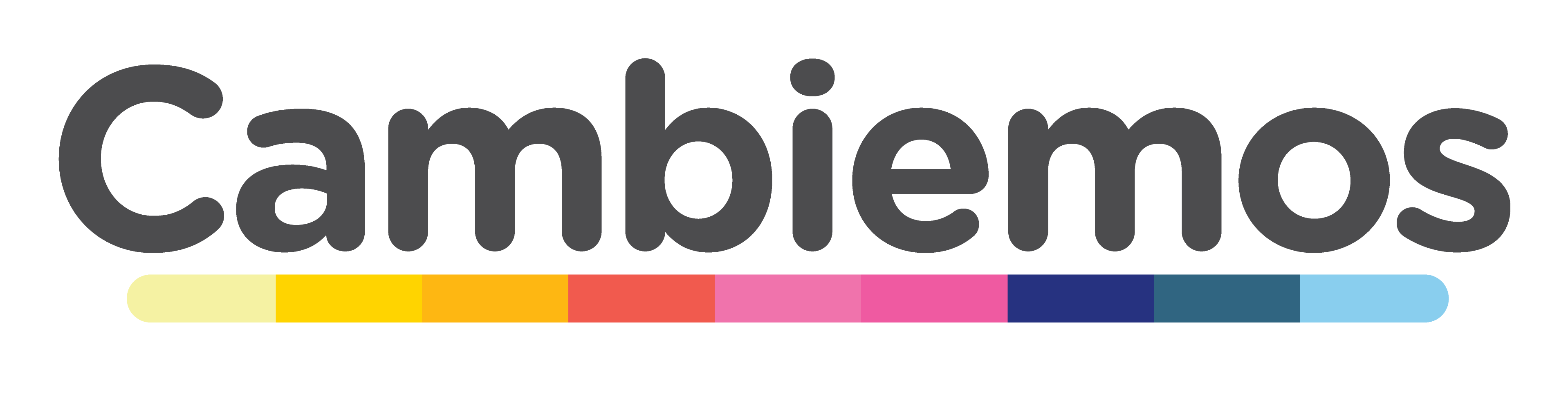 Cambiemos partido político